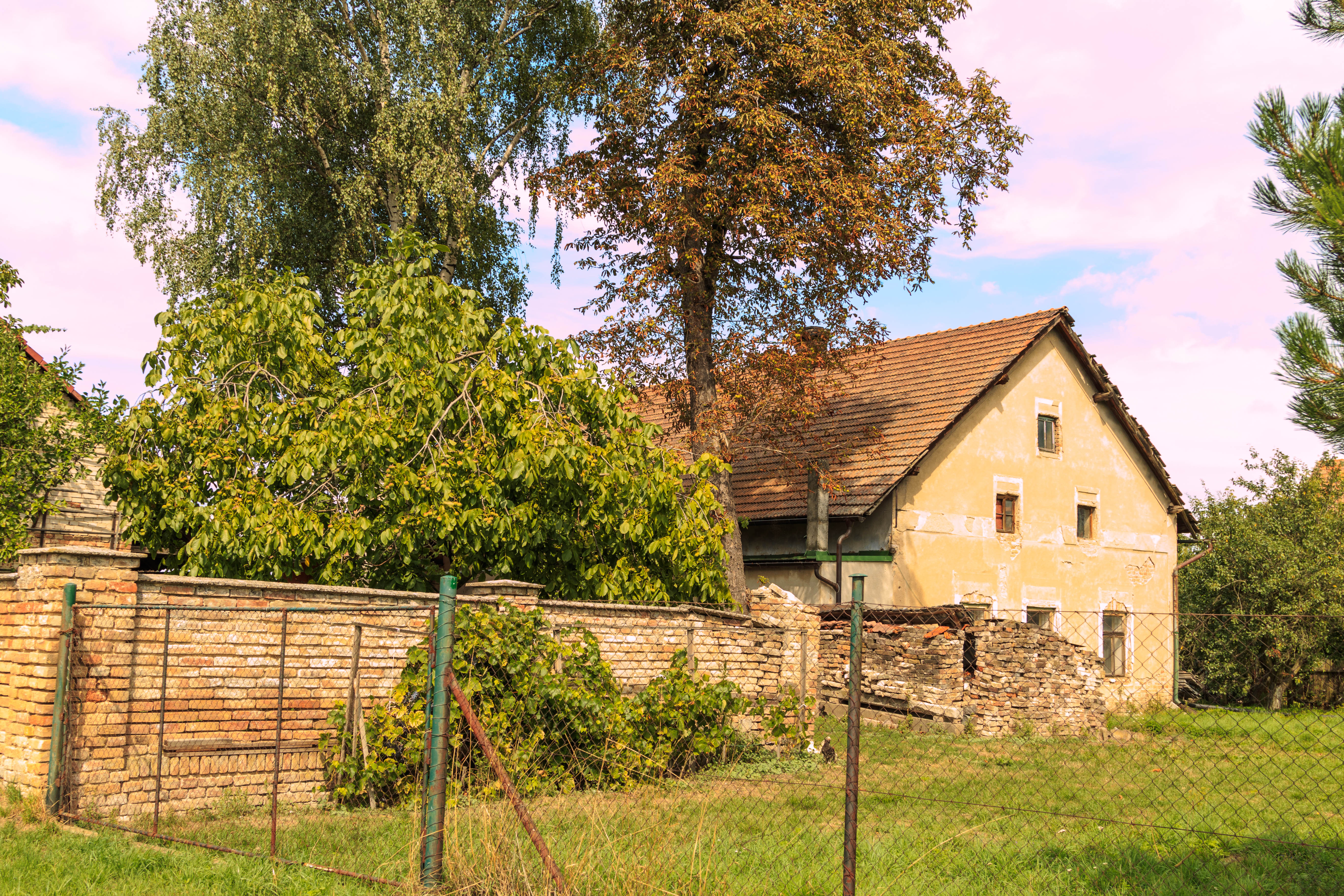 Platěnsko čp. 1